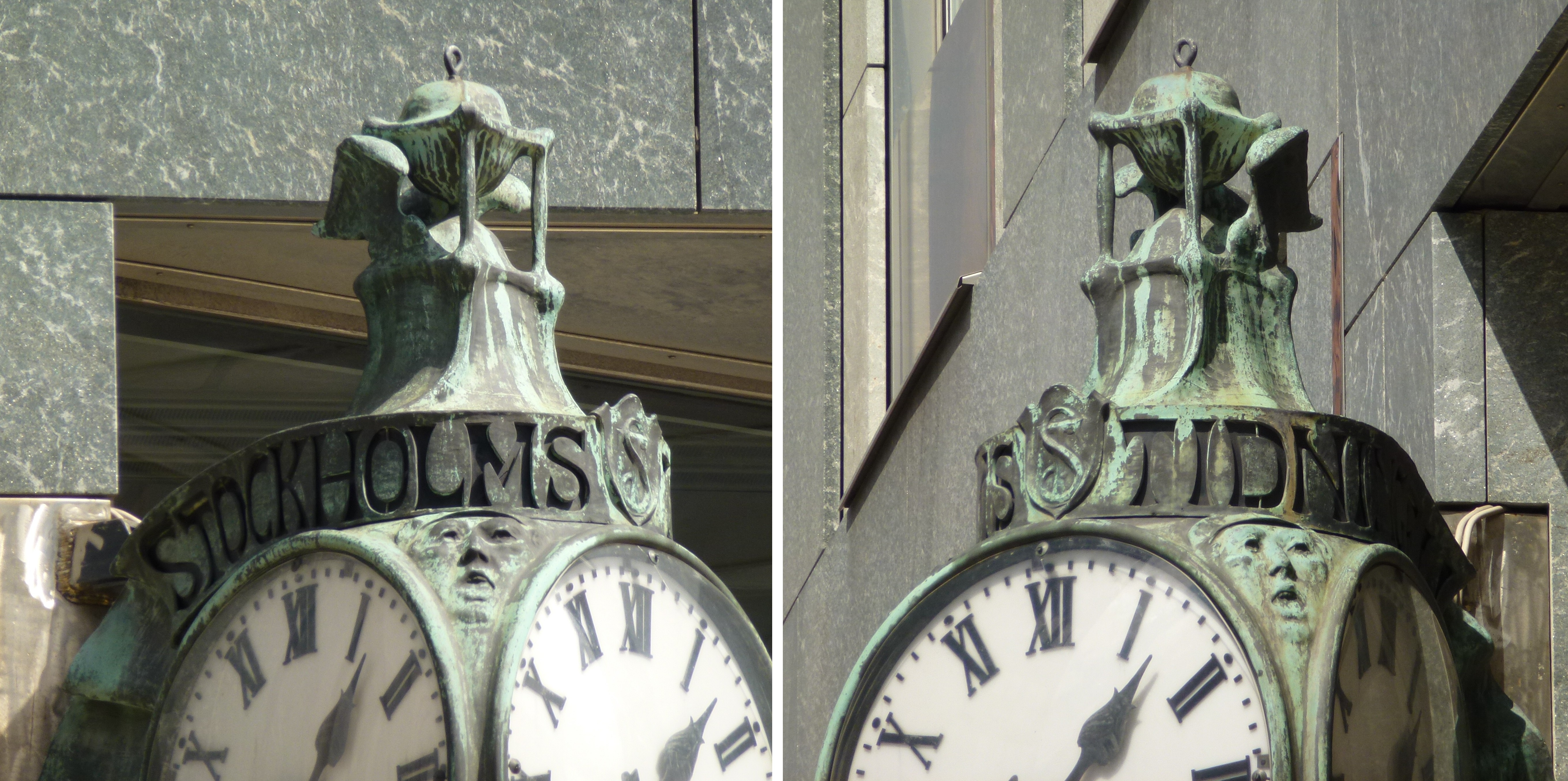 Stockholms Tidningens ur detalj